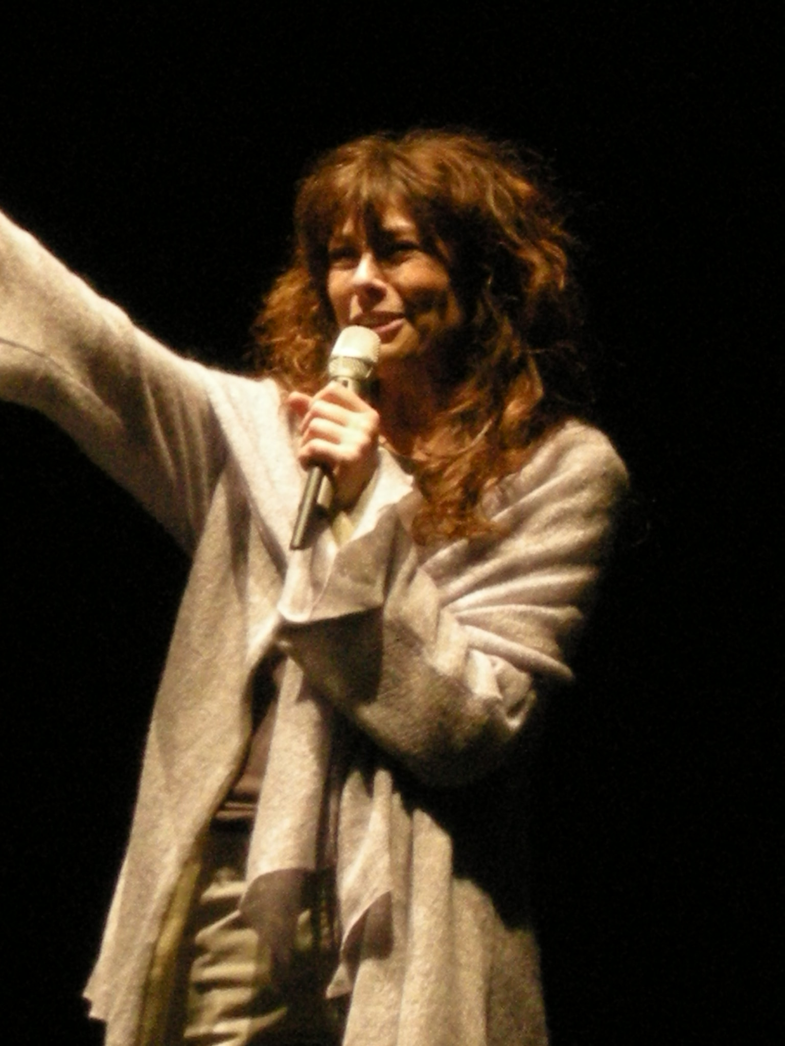 Alice @ Prato 20-03-09, 04